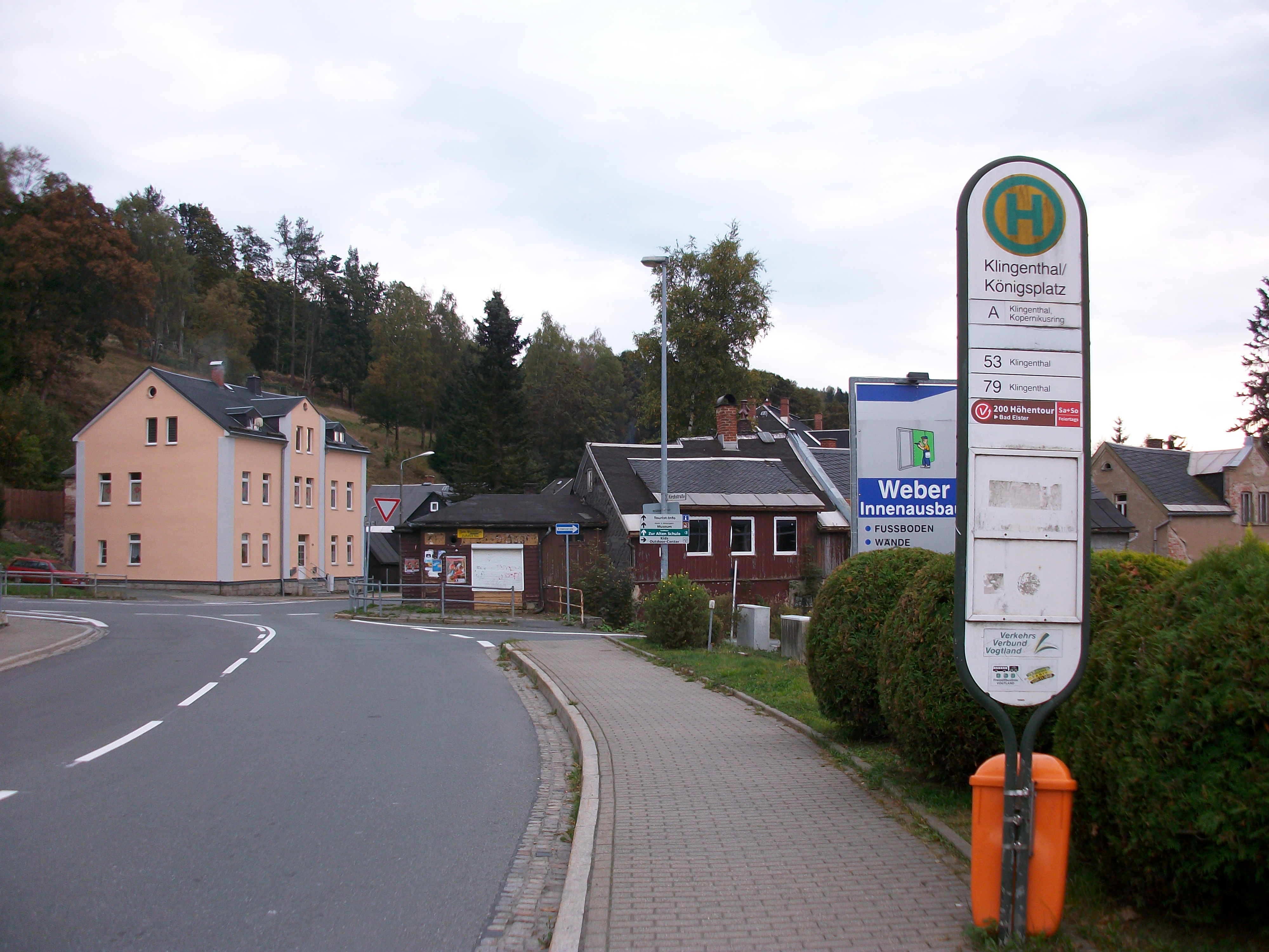 Ehem. Haltepunkt Brunndöbra Königsplatz bzw. Karl-Marx-Platz (2016)